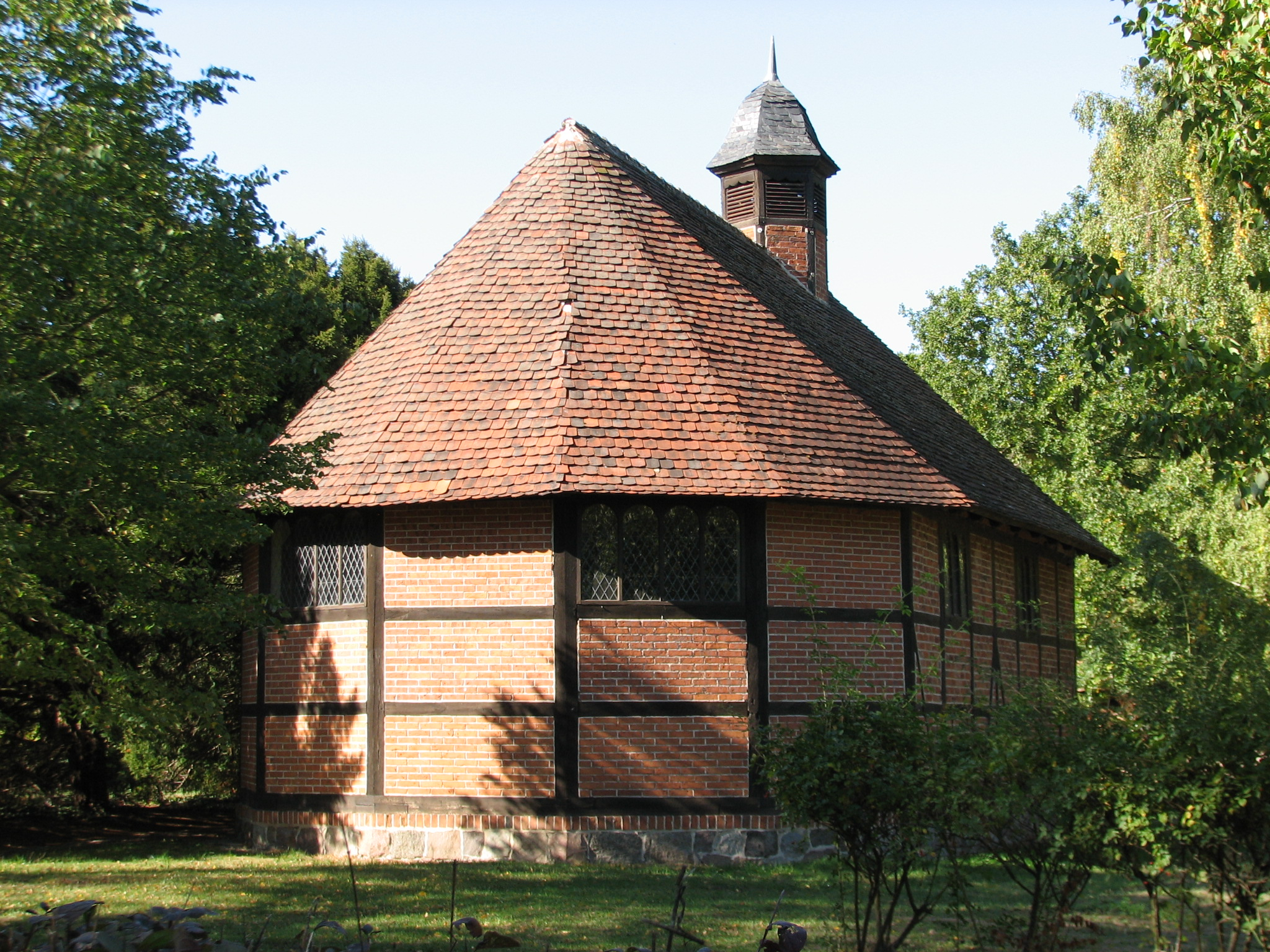 Kapelle zu Briest (Oktober 2018)